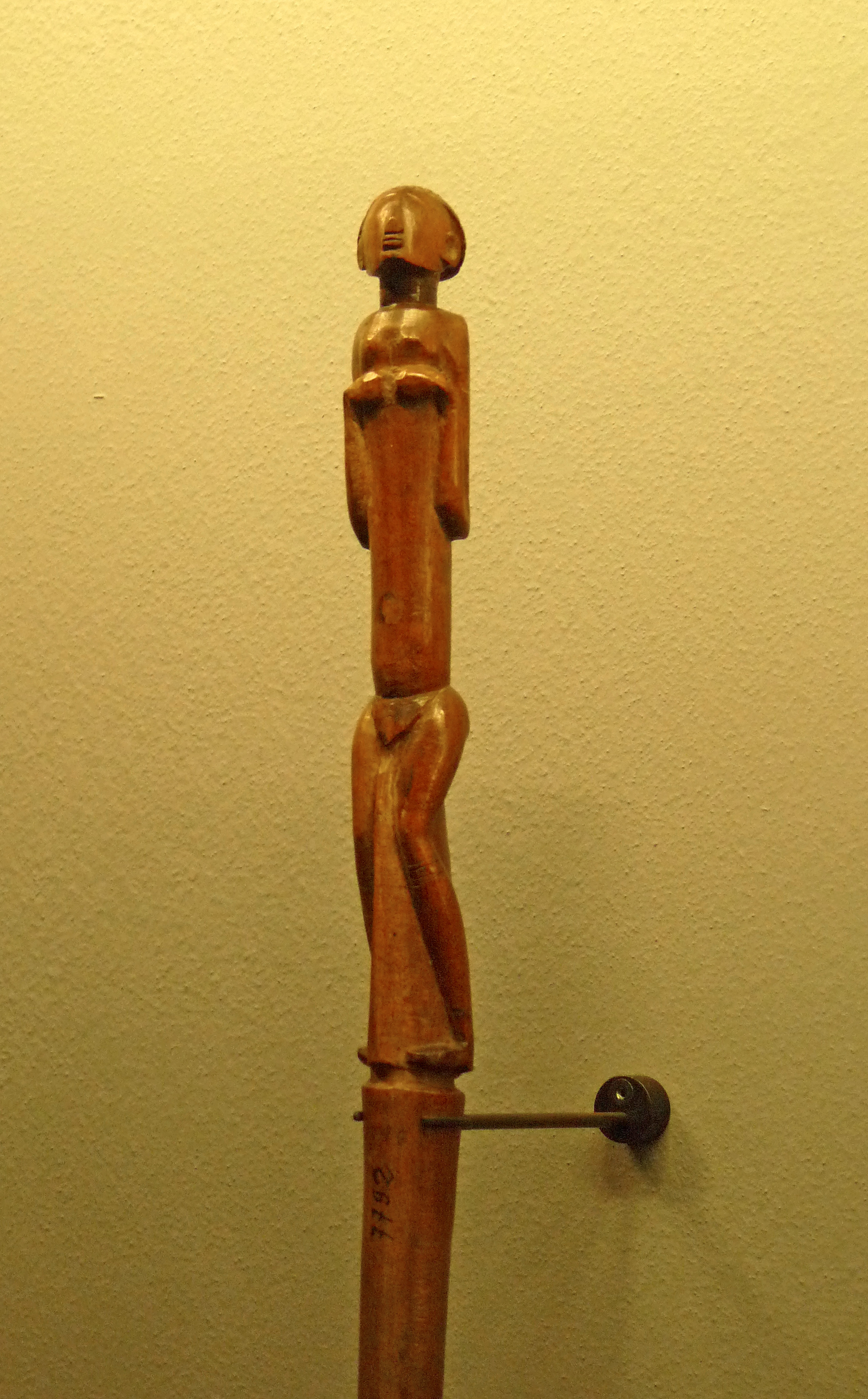 Canne anthropomorphe, population Mfengu, Afrique du Sud, seconde moitié du 19e siècle, bois. Musée du quai Branly.